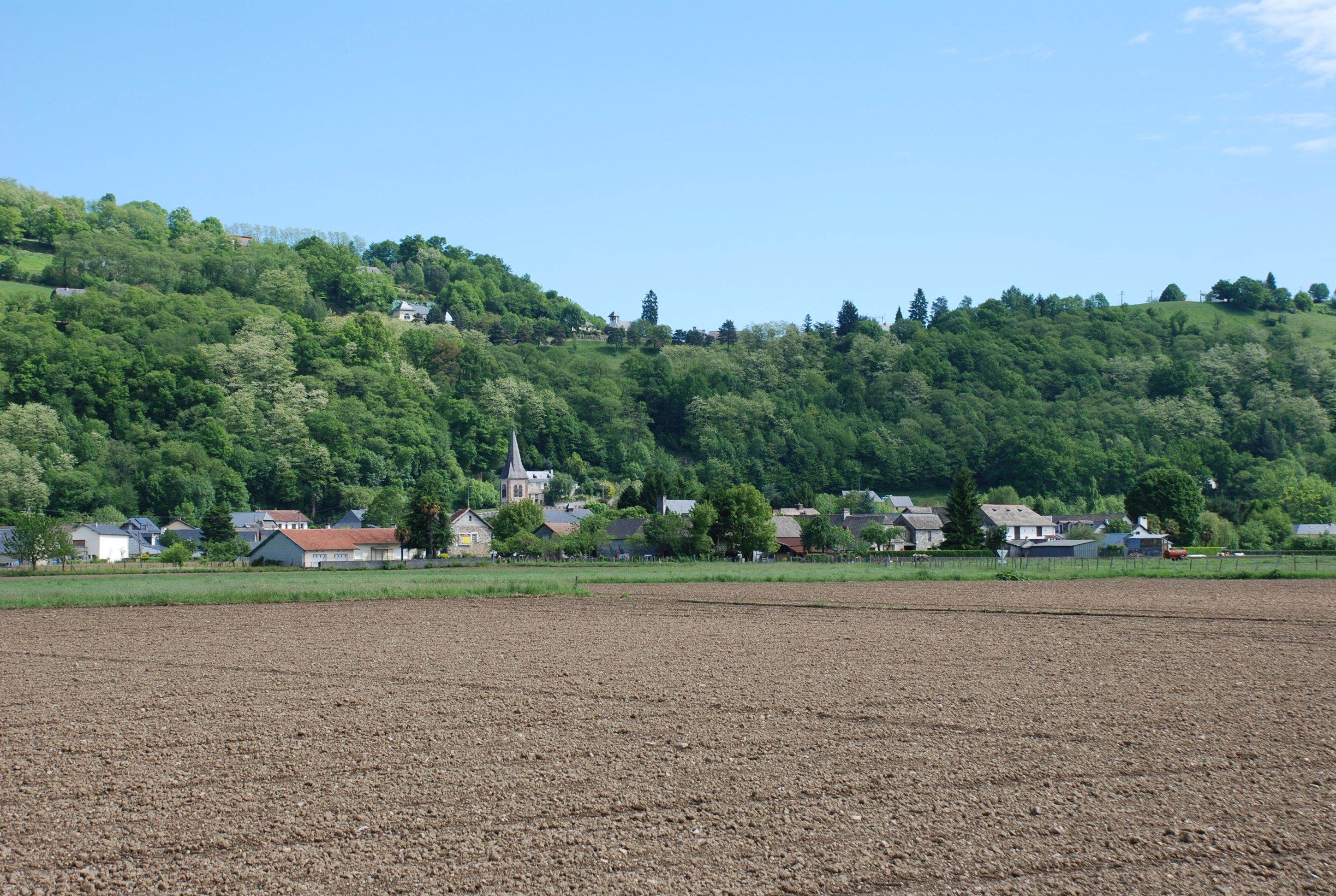 Centre du village de Lézignan photographié depuis la route départementale de Lourdes à Bagnères de Bigorre, au lieu dit Piole. Le village s'étend pour l'essentiel dans la plaine vers un lotissement dit de La Plaine, à droite, non visible sur la photo. Au dessus de Lézignan, sur la ligne collinaire, se situe le village de Bourréac dont on voit l'église.